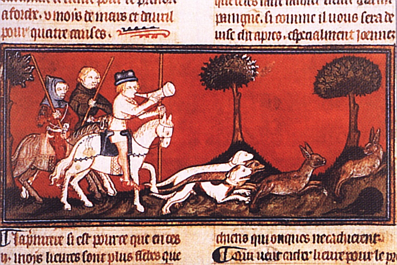 Parforcejagd auf Hasen, Jagdbuch des Roy Modus, 14. Jahrhundert